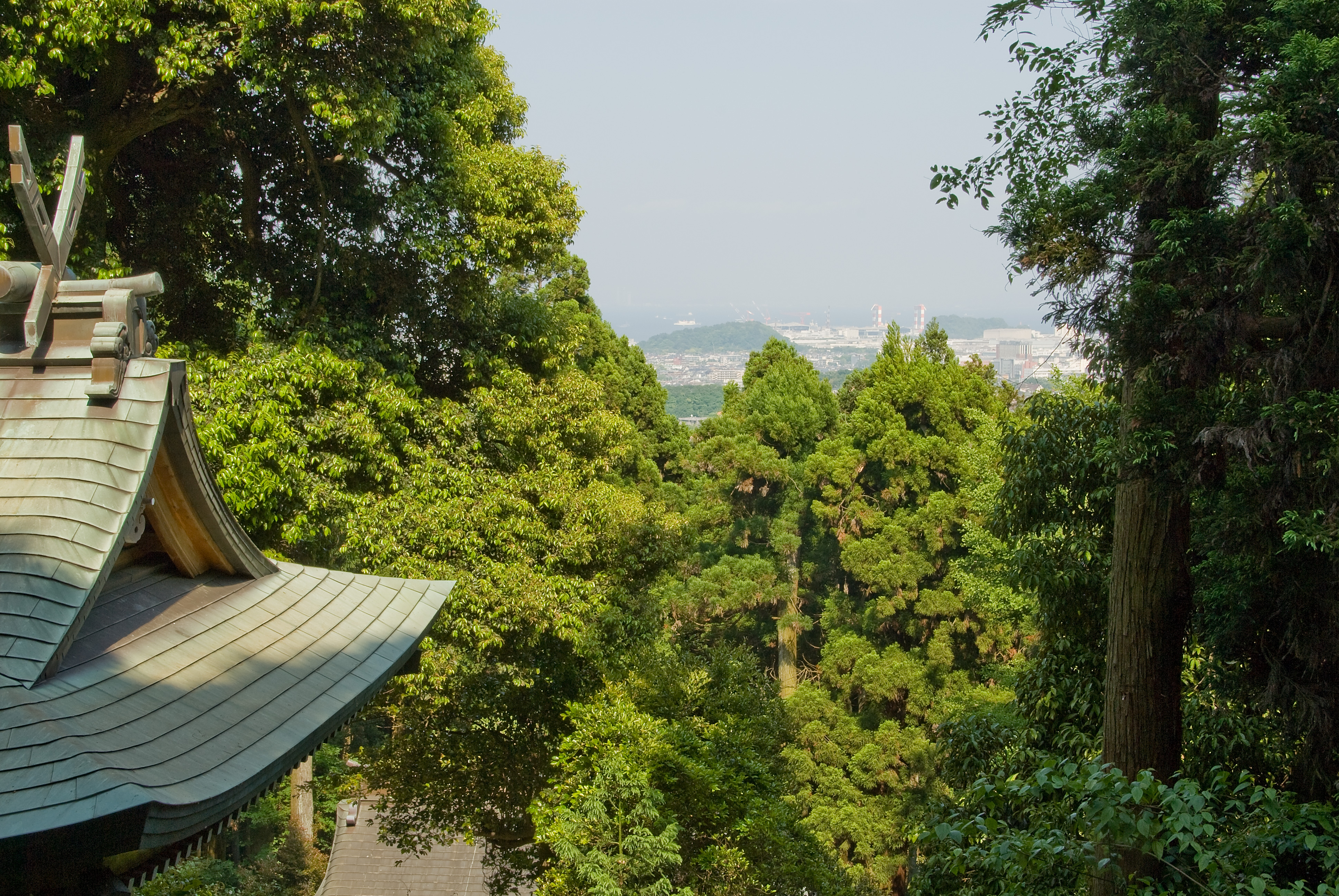 Kumano Jinja, Asaina Pass, Kamakura. Kanazawa in the distance.